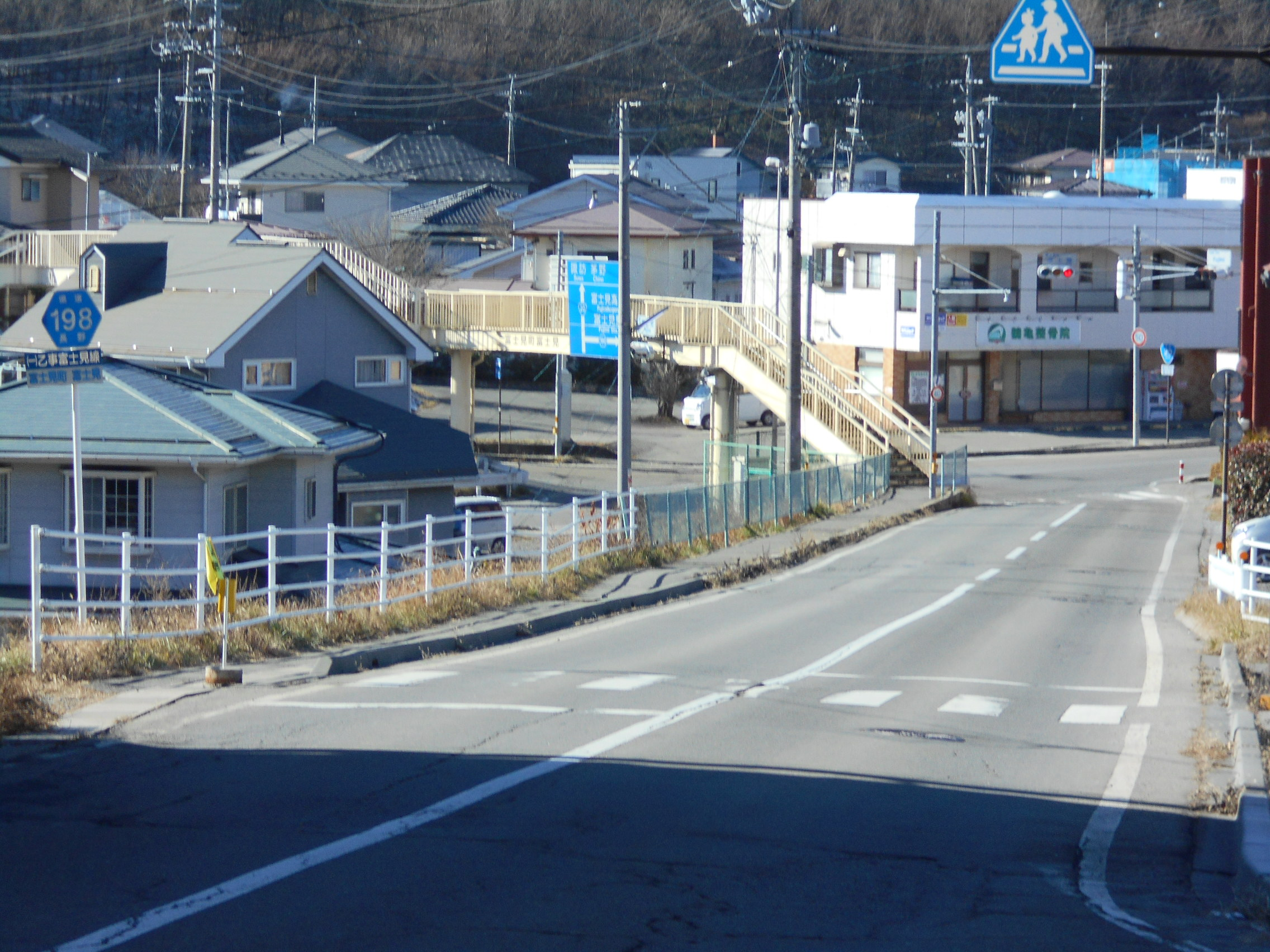 長野県道198号乙事富士見線 長野県富士見町富士見